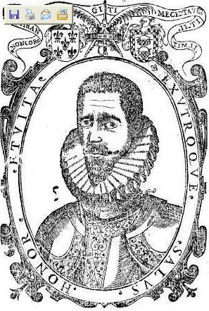 Luis Pacheco de Narváez (1570-1640)